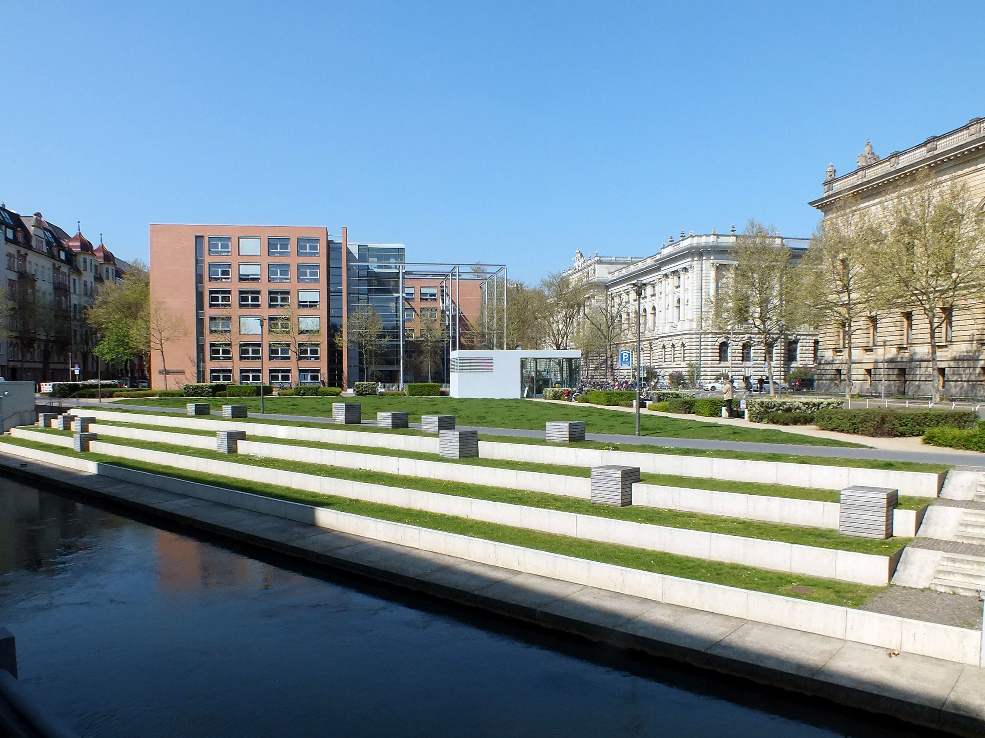 Das Mendelssohn-Ufer am Pleißemühlgraben in Leipzig mit der Darstellung der Anfangsnoten des Violinkonzertes e-moll von Felix Mendelssohn-Bartholdy durch Holzwürfel auf den Terrassenstufen